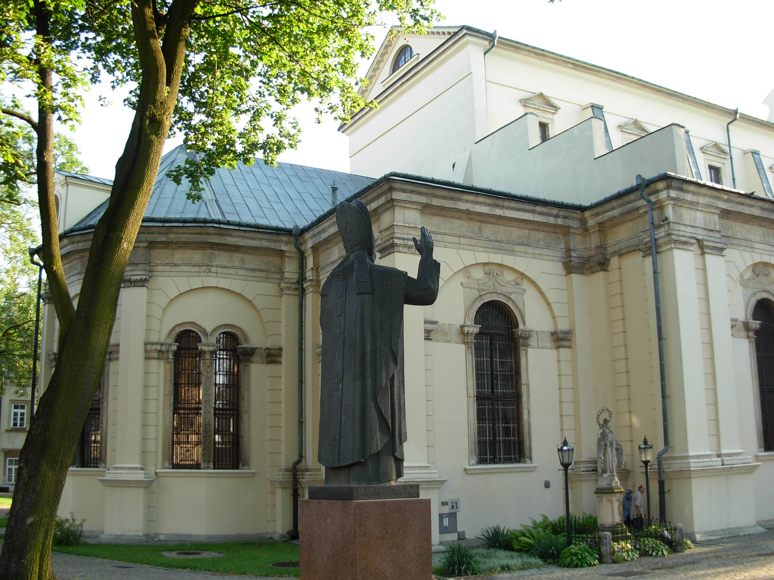 Zamość, Poland.